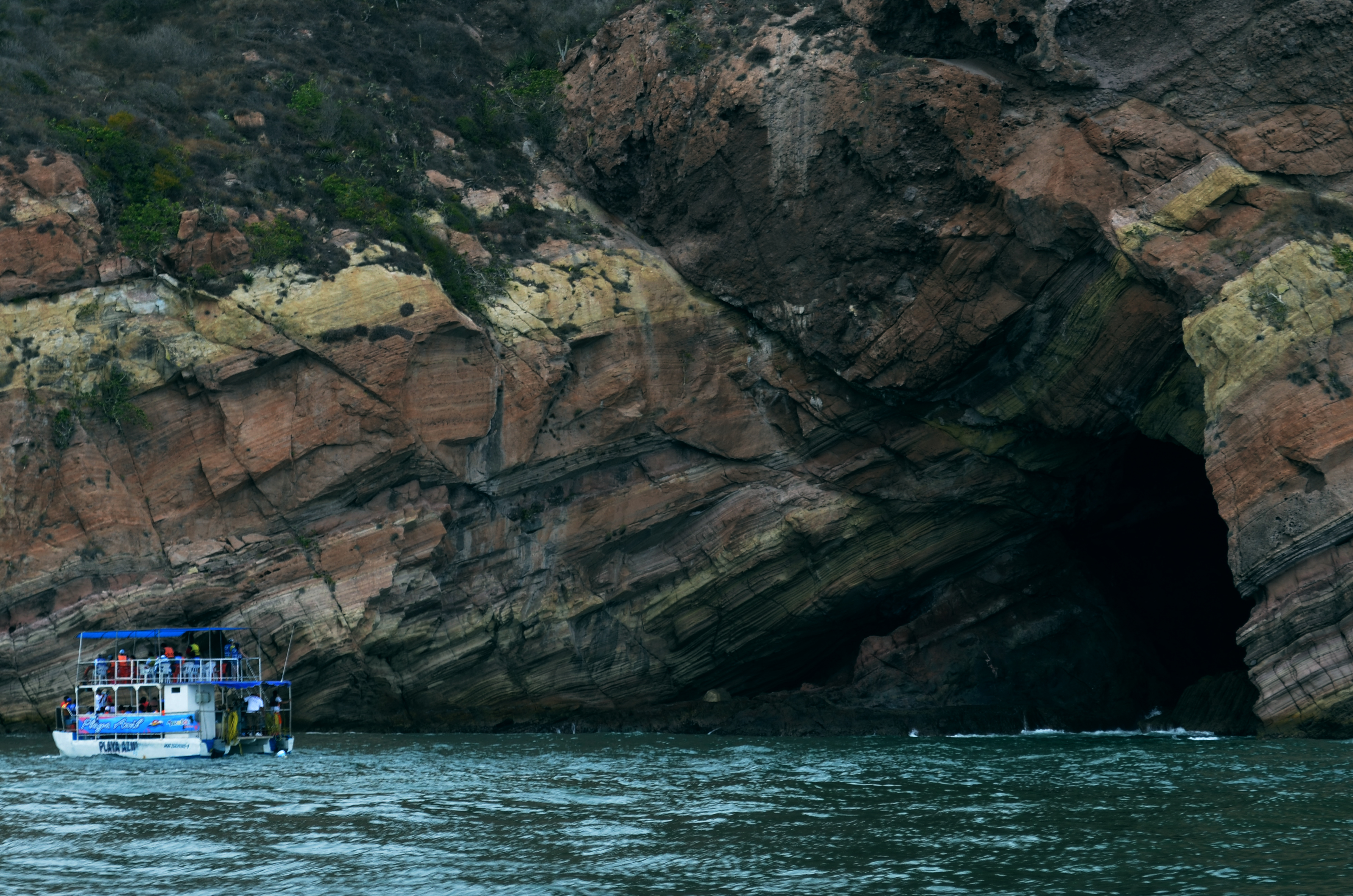 Paseo en Yate, Mazatlán, Sinaloa, México